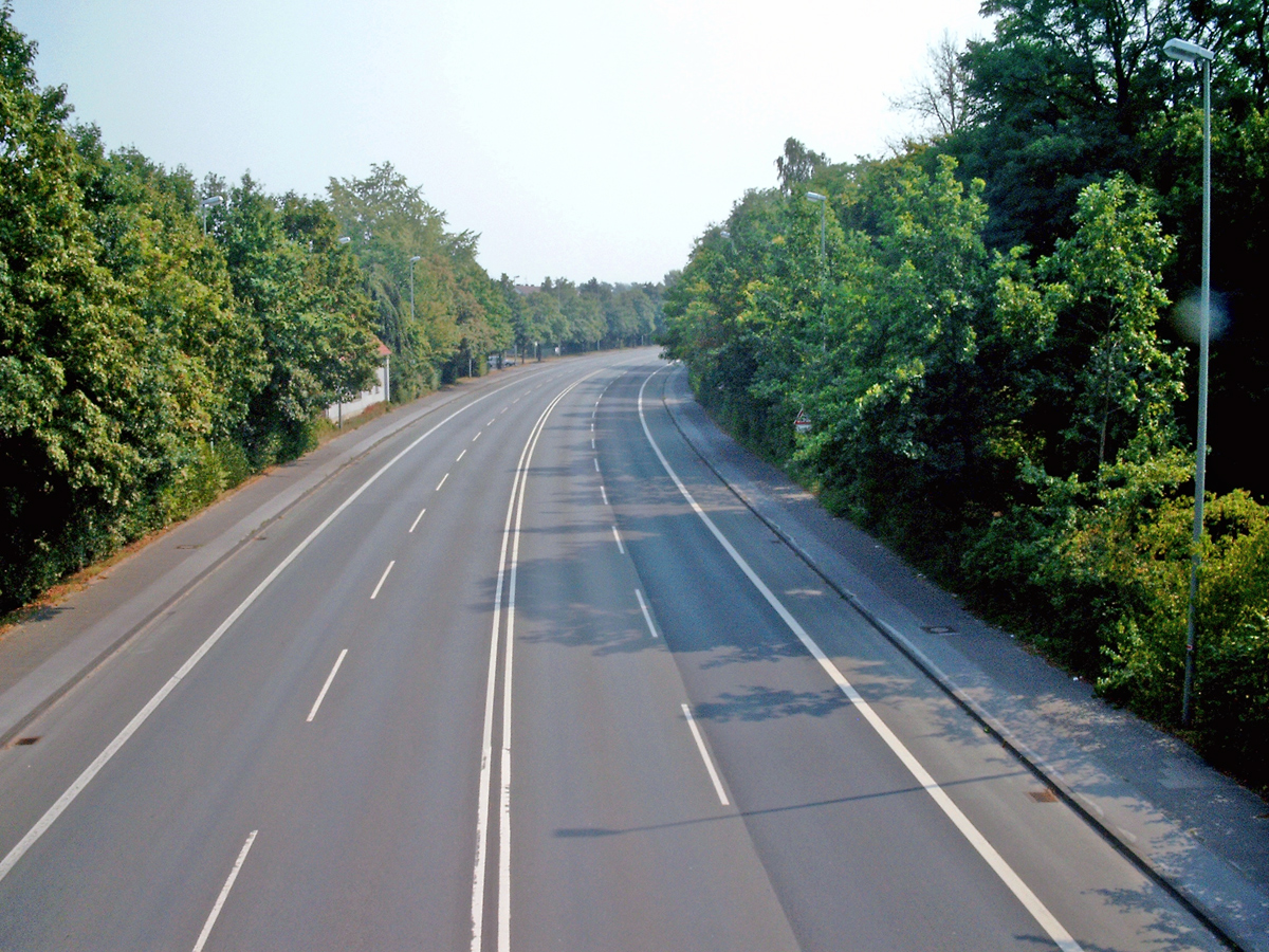 B61/Westring in Gütersloh